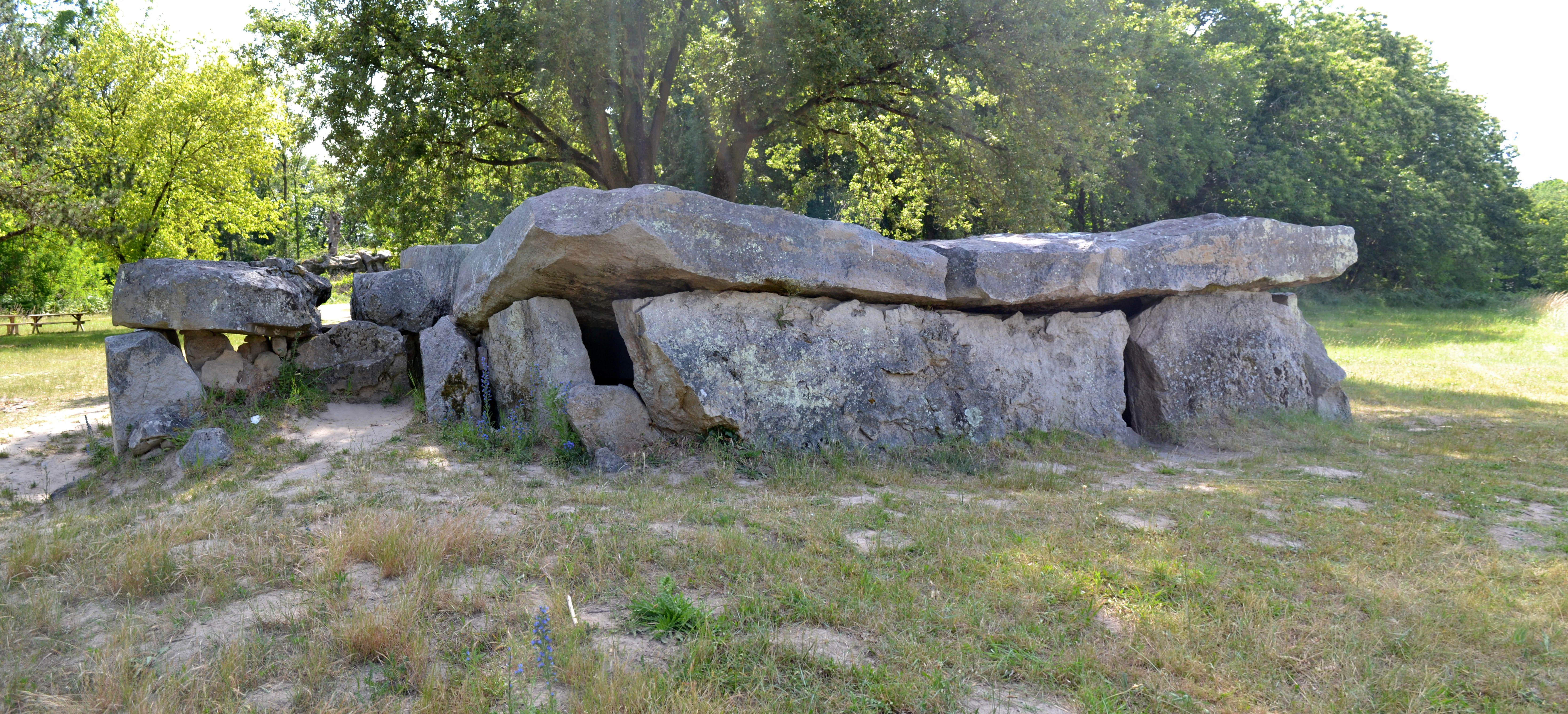 Dolmen de la Bajoulière à Saint-Rémy-la-Varenne (49).